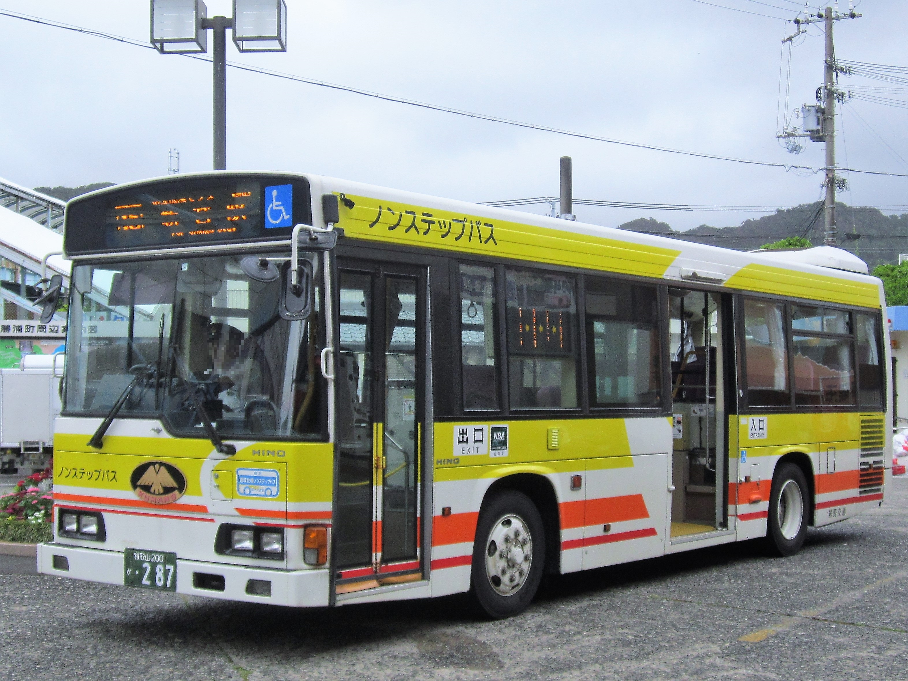 紀伊勝浦駅前に停車中の熊野交通バス